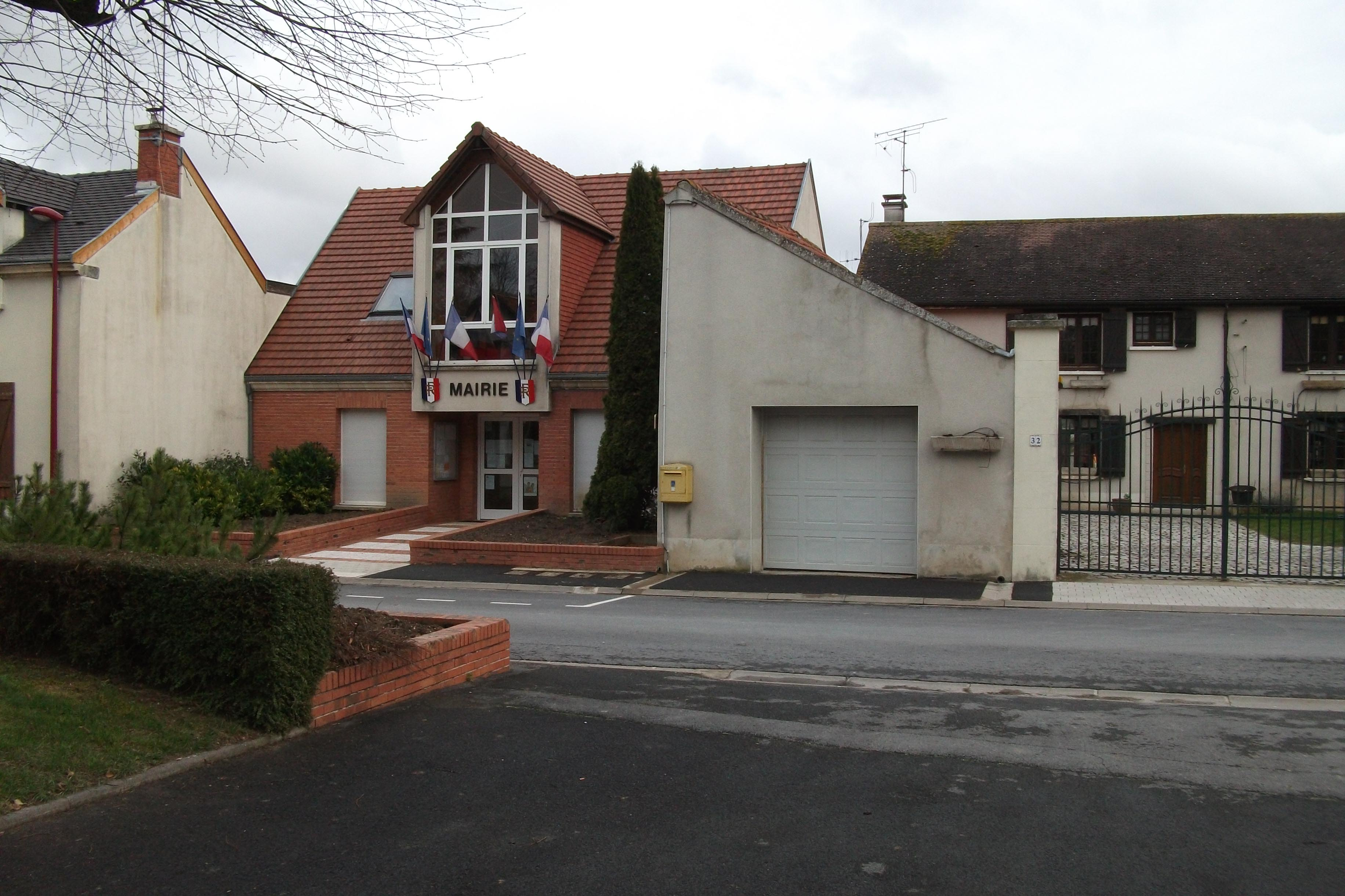 vue de la mairie de Champfleury.